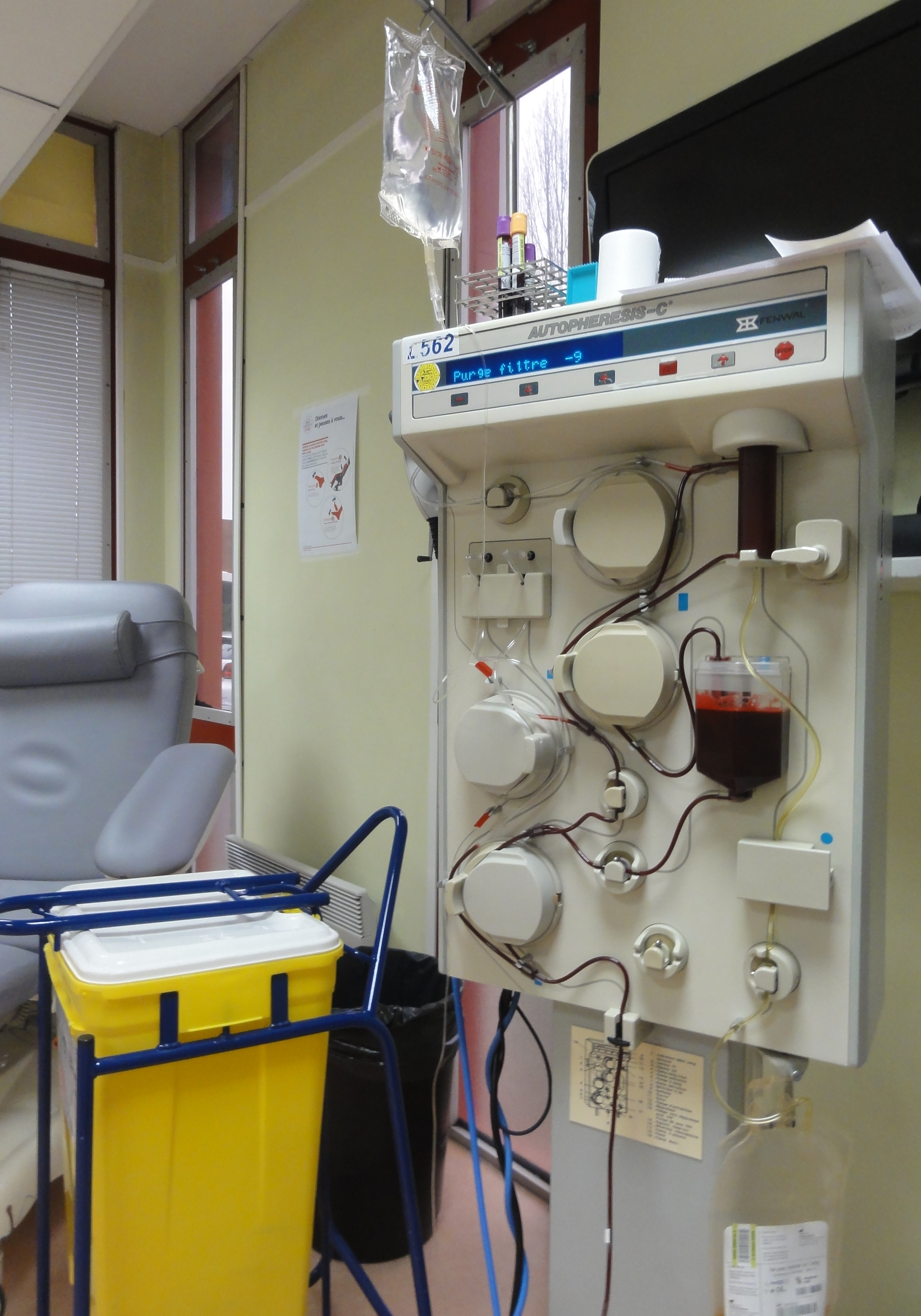 Depicted place: Valenciennes